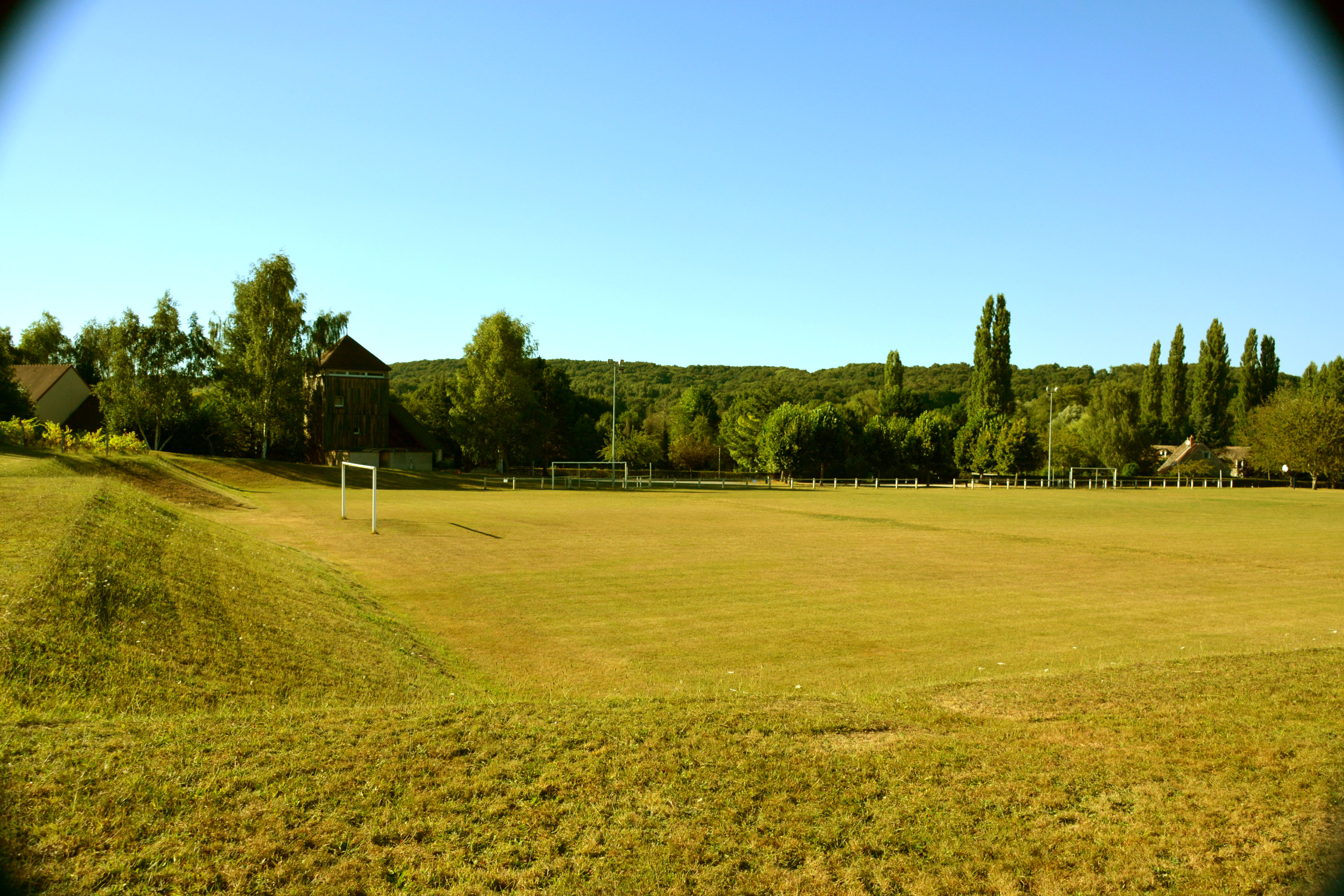 Plateau sportif et Grange de Malassis salle communale